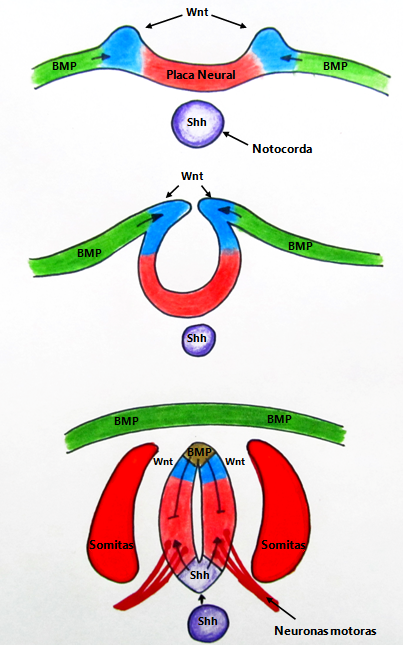 La secreción de Sonic hedgehog se produce inicialmente por la notocorda durante la formación del tubo neural. Posteriormente es secretado por las células de la placa del piso.